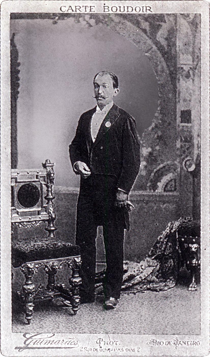 Este retrato lo realizó el famoso fotógrafo portugués José Ferreira Guimarães en la ciudad de Río de Janeiro (Brasil), y dado que figura la dirección del estudio al pie de la foto (rua Gonçalves Dias, nº 2), podemos datarla entre la fecha en que se inauguró dicho estudio, 1886, y la disolución del grupo, en 1899. Según se anuncia en la prensa local, este tipo de fotografías tenían un precio de 12.000 reales, lo cual es mucho dinero; seguramente la fotografía se tomó durante una de las giras del grupo, que realmente alcanzó enorme éxito en varios países americanos.